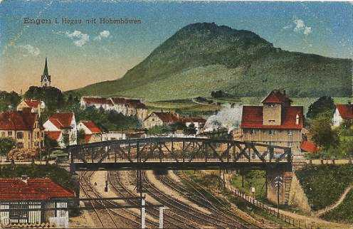 Ansichtskarte Engen im Hegau mit Hohenhewen